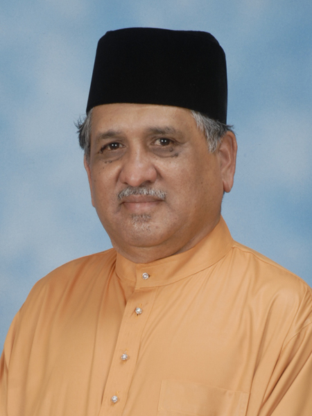 Gambar Dr Muhammad Nur Manuty